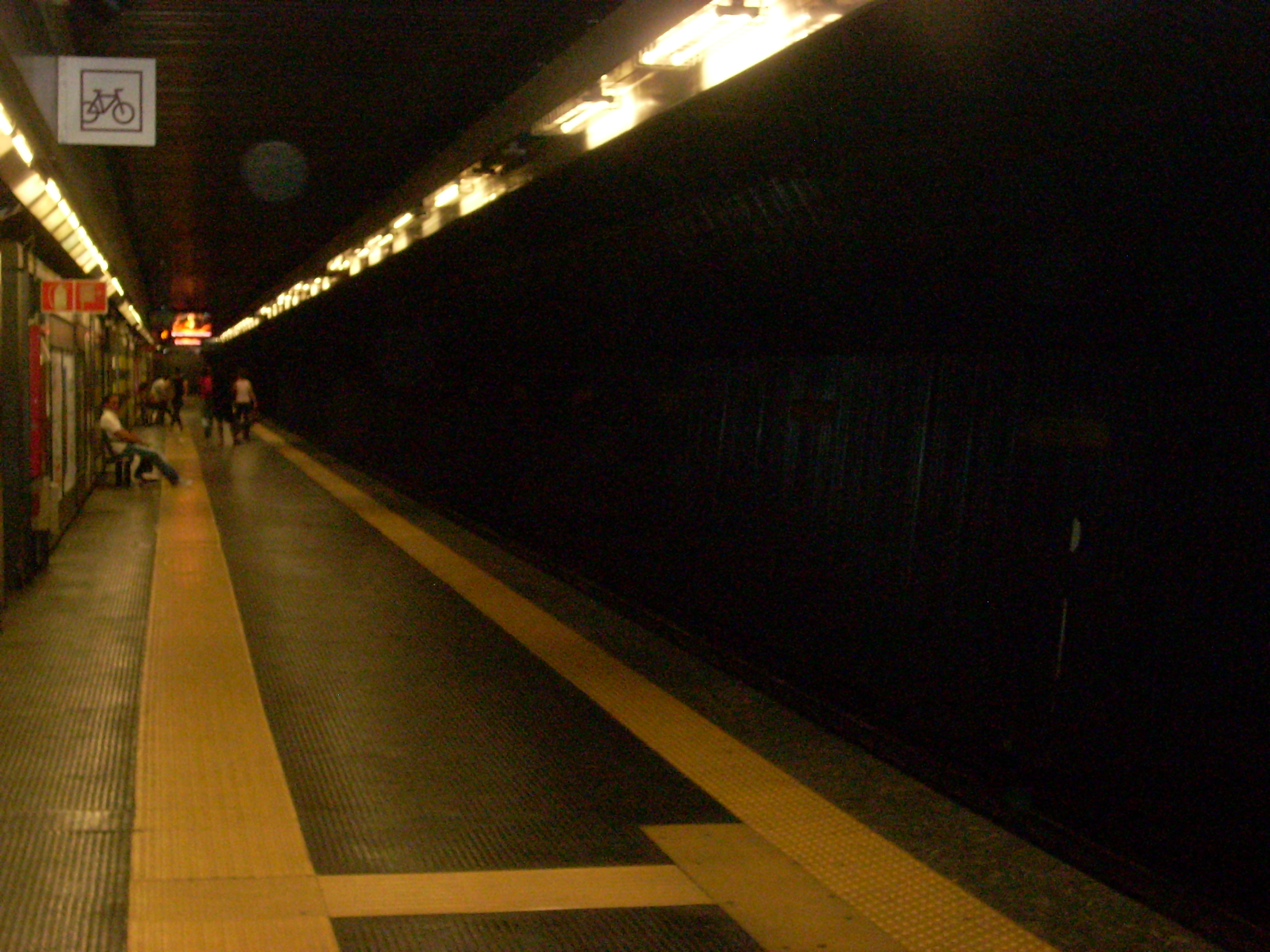 La banchina di Policlinico (metropolitana di Roma)